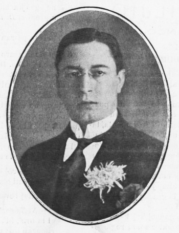 Roberto Maraury Barredo, hispana esperantisto